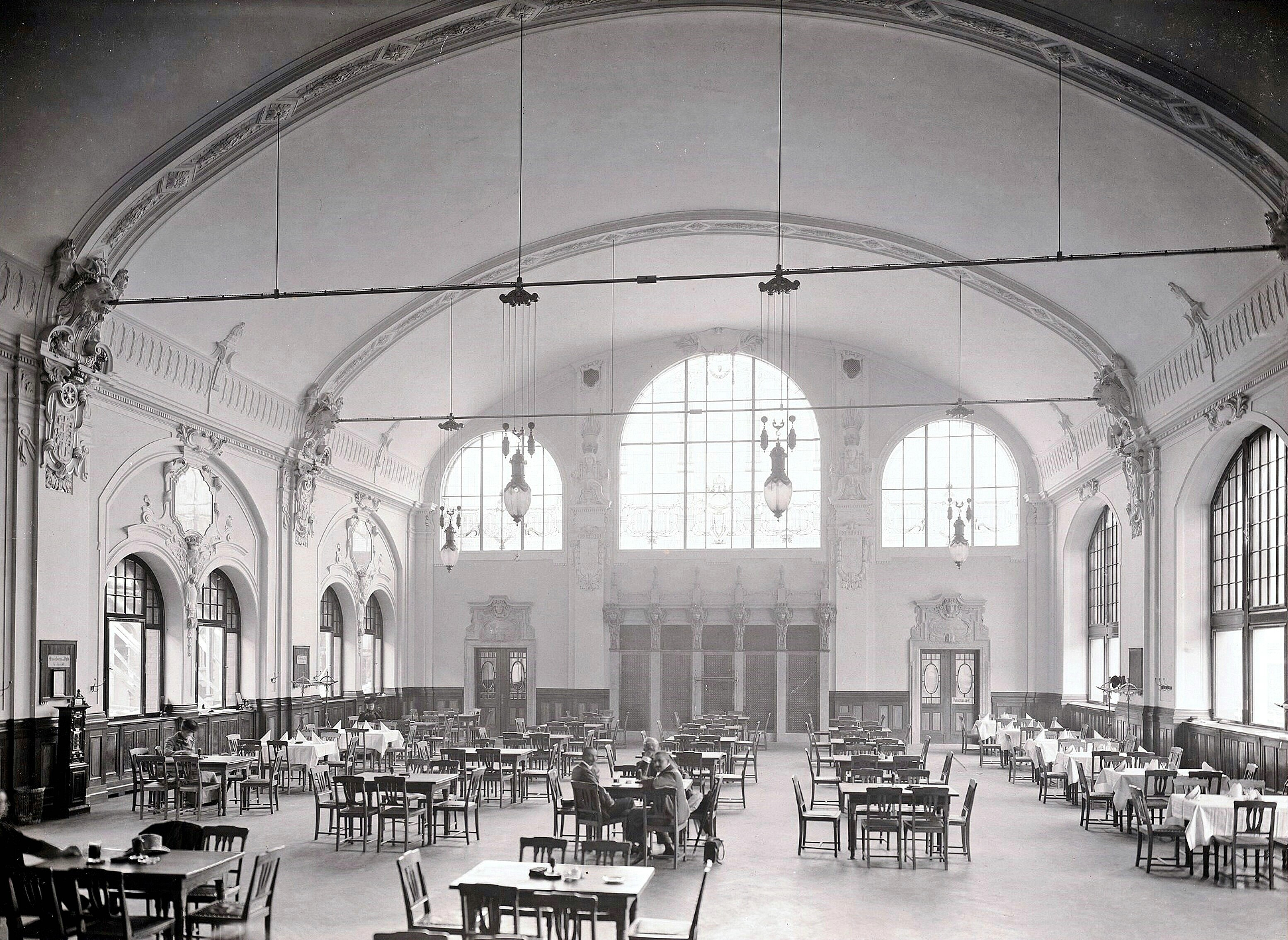 Stettiner Bahnhof, Wartesaal II. Klasse